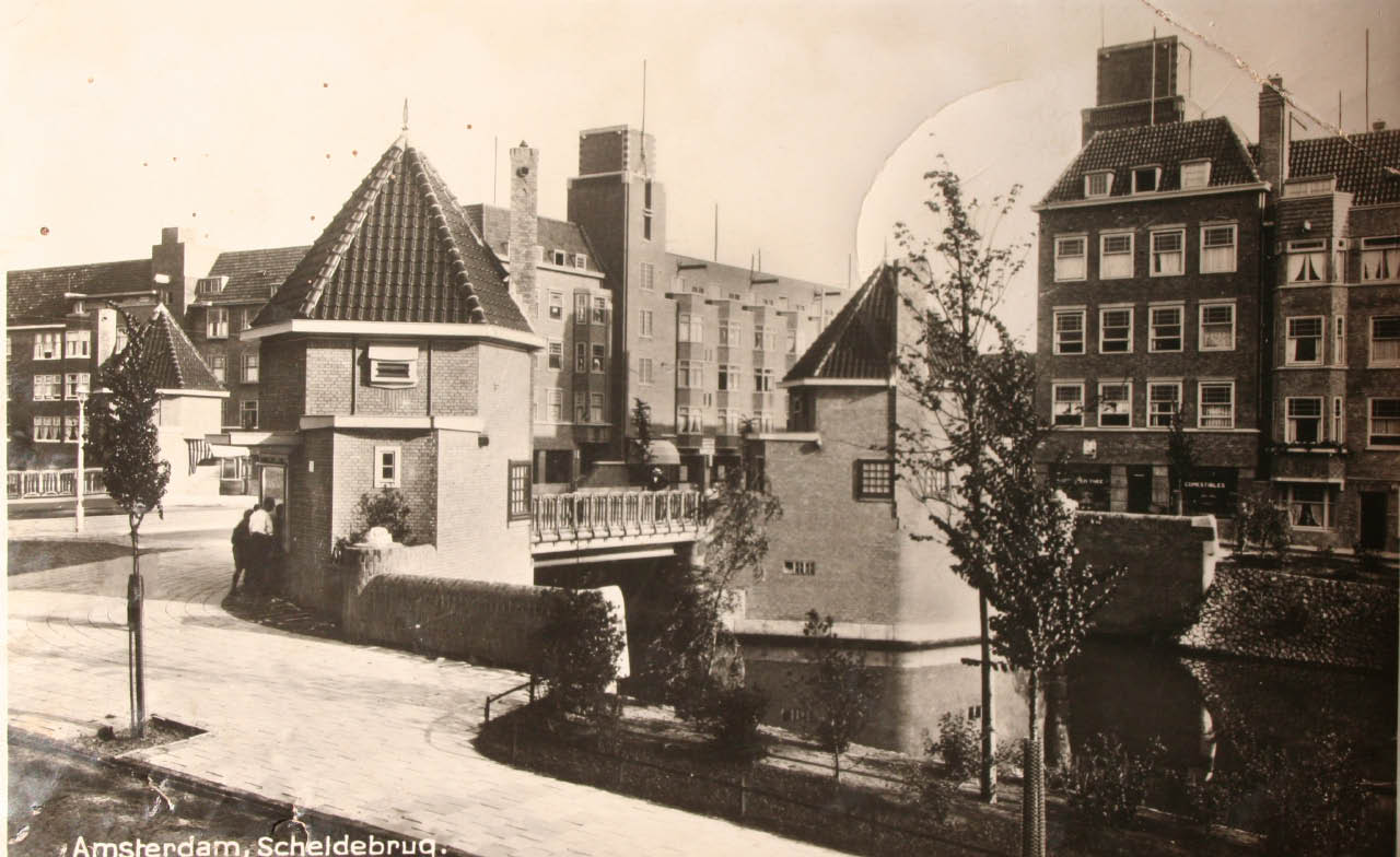 Brug voor de Scheldestraat, Amstelkade en Joseph Israelskade ansichtkaart.